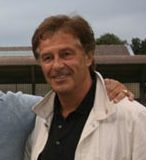 Le professeur Patrice Roynette, Magali le Floch, Bernard Carayon, Henri Sannier.